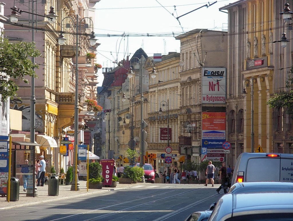 Ulica Gdańska w Bydgoszczy